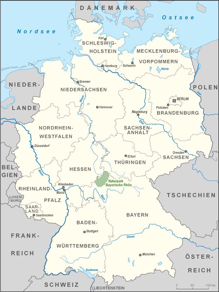 Karte des Naturparks Bayerische Rhön in Deutschland